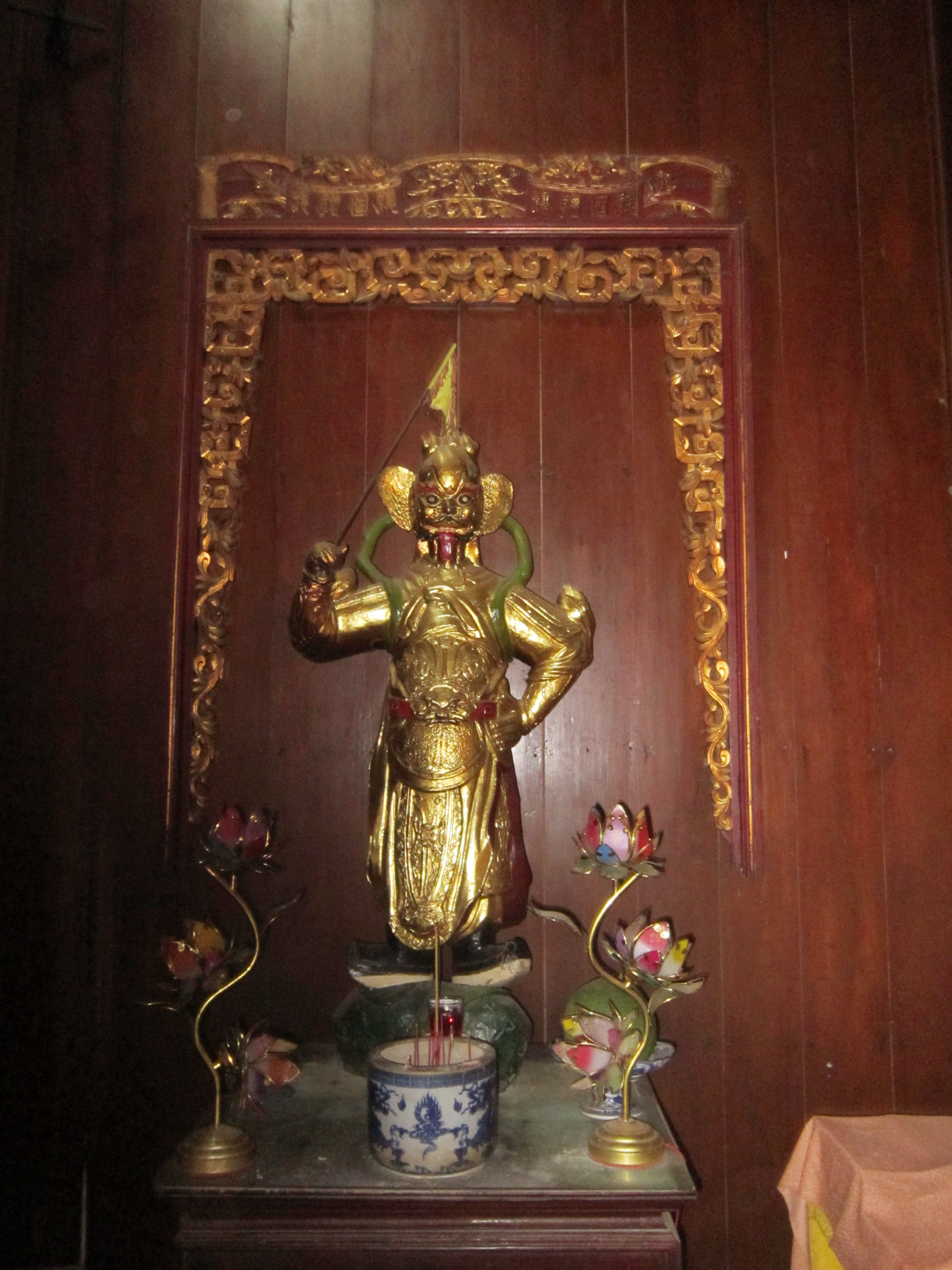 Tượng Tiêu Diện Đại Sĩ trong chùa Vĩnh Tràng, Mỹ Tho, Việt Nam.Tiêu Diện Đại Sĩ (còn được gọi là Ông Ác, hay Ông Tiêu) thường được thờ trong nhiều ngôi chùa ở Trung Quốc, Việt Nam, v.v